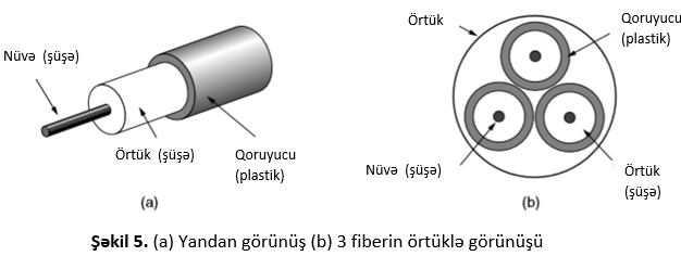 fiber kabel